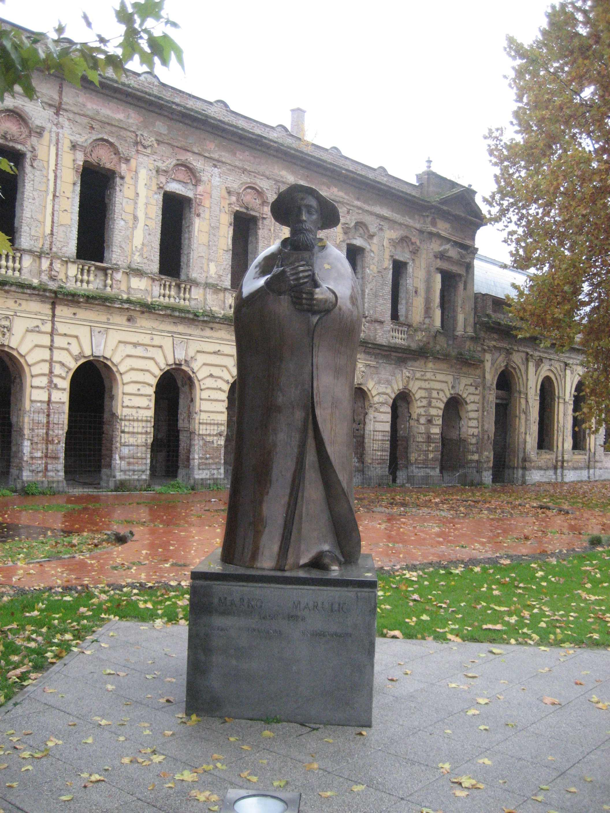 Marko Marulic Denkmal in Vukovar by Vasko Lipovac